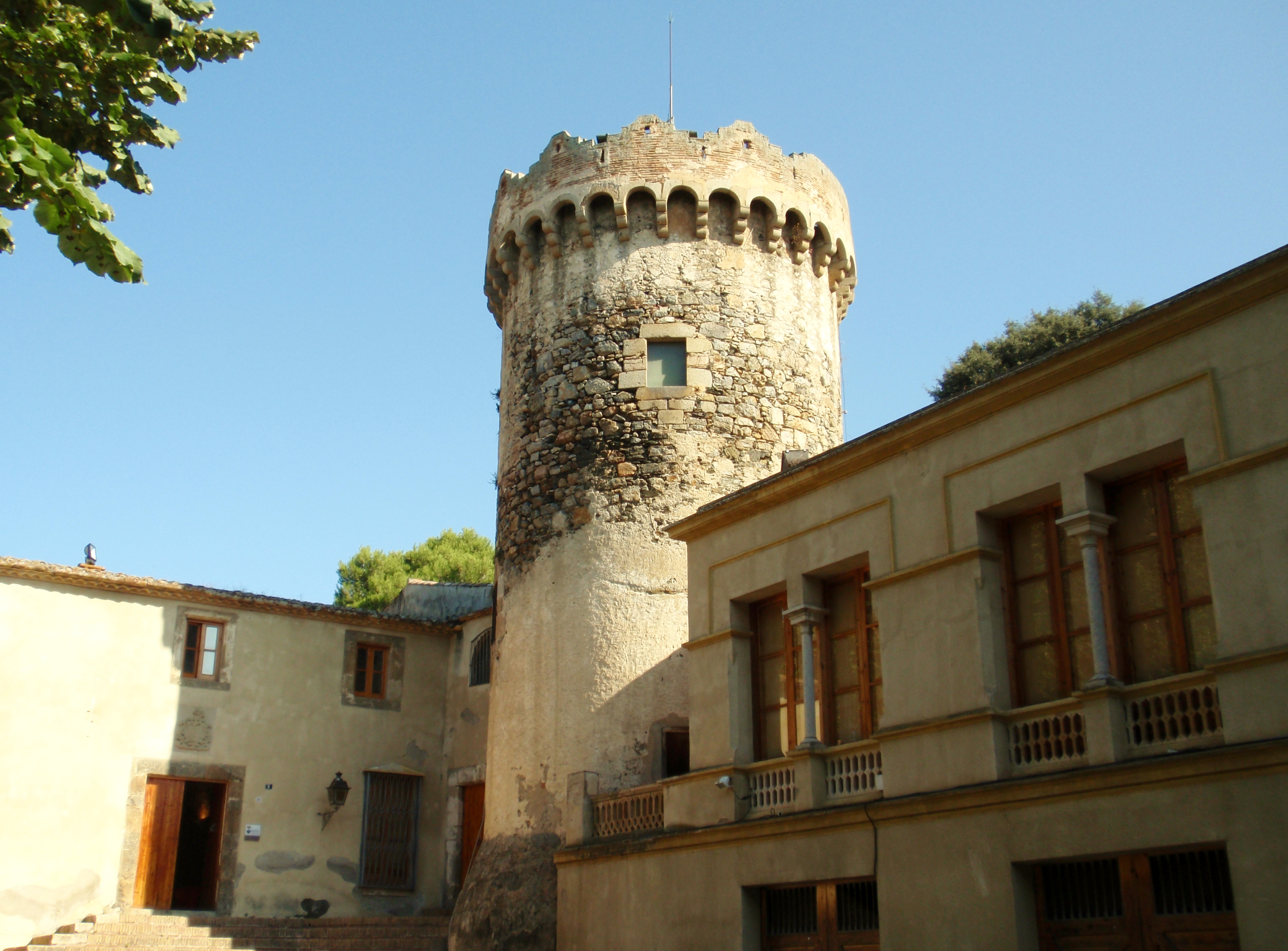 Torre de Can Ratés, Raters o Roters (Santa Susanna)